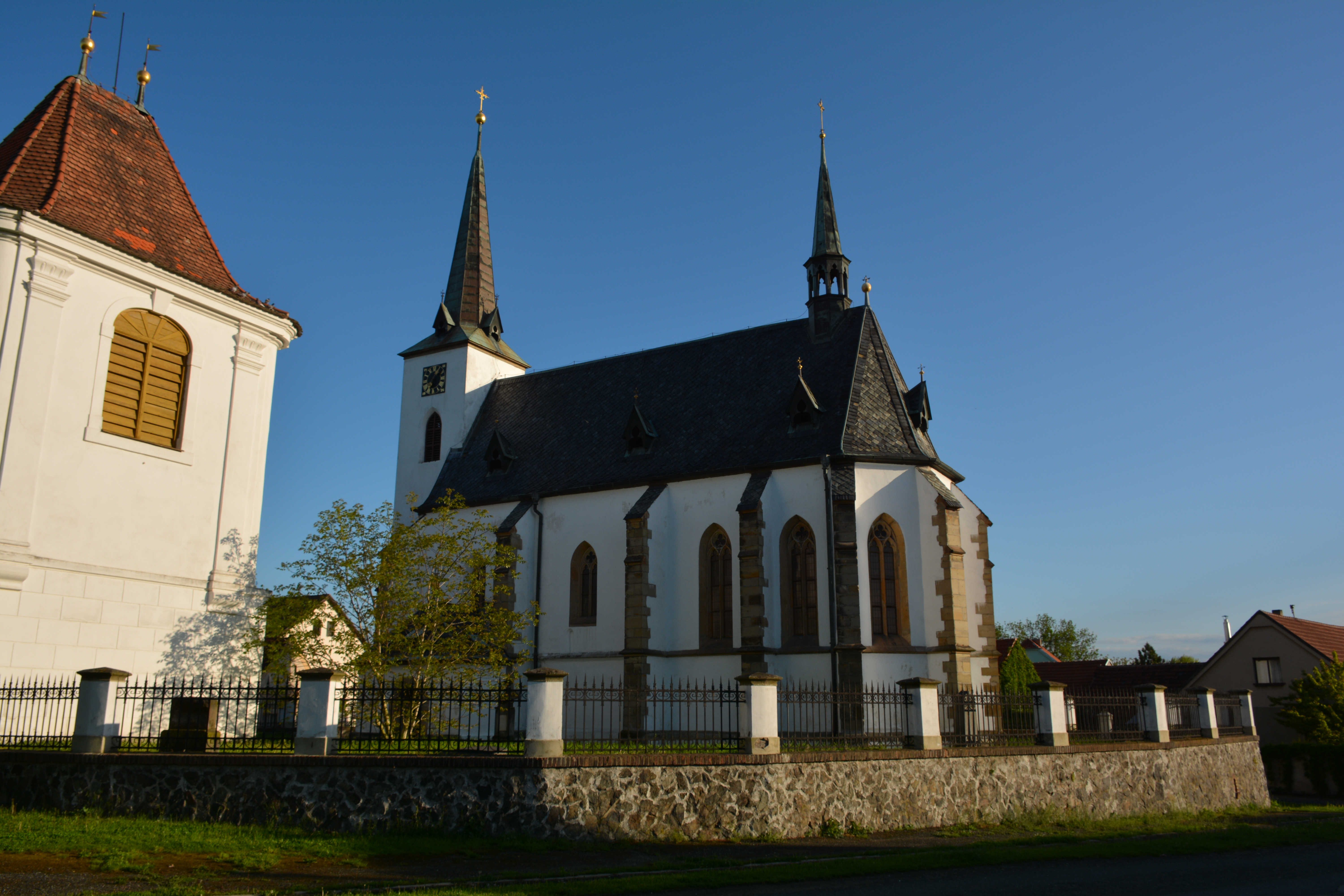 jihovýchodní pohled